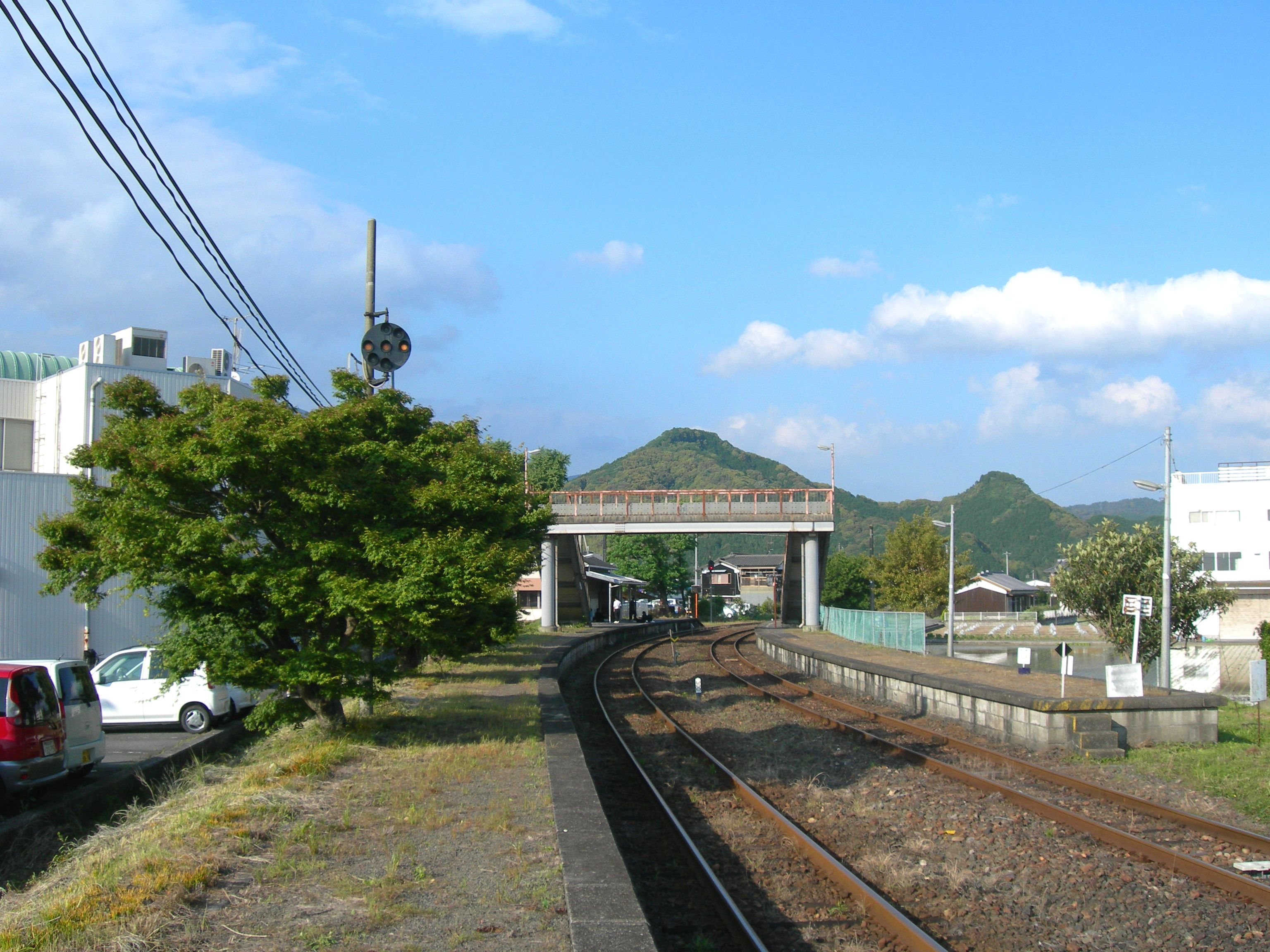 予土線 伊予宮野下駅 ホーム